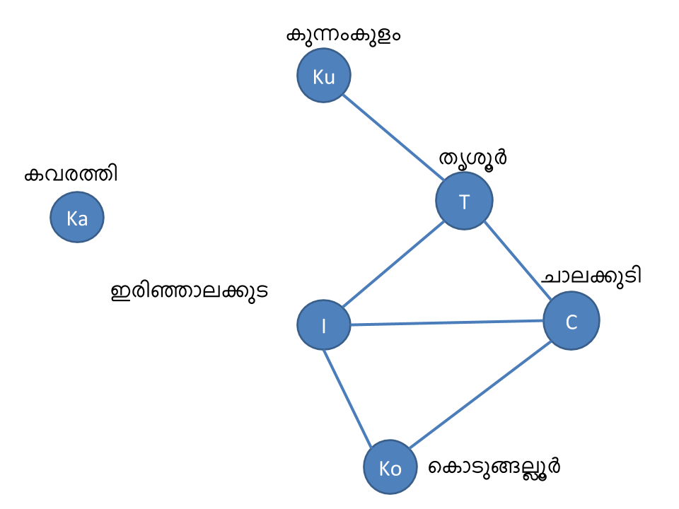 കേരളത്തിലെയും ലക്ഷദ്വീപിലെയും പട്ടണങ്ങളെ ശീർഷങ്ങളായും അവ തമ്മിലുള്ള റോഡ് ബന്ധങ്ങൾ വക്കുകളായും പരിഗണിച്ചാൽ കിട്ടുന്ന ലേഖ